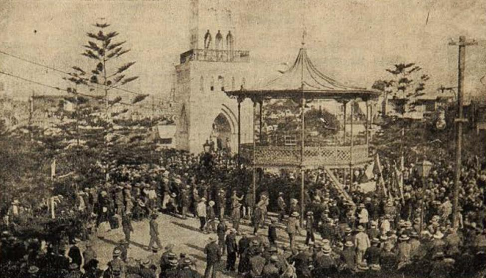 Matanza de la Escuela Santa María de Iquique. "Meeting de obreros en la Plaza Arturo Prat (Iquique)".